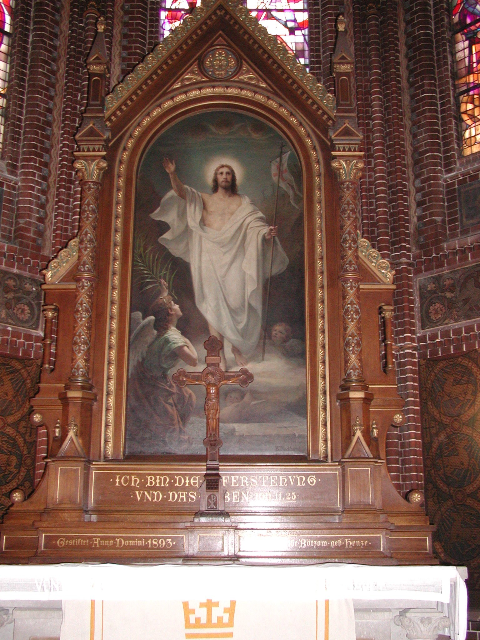 Altarbild der Immanuelkirche